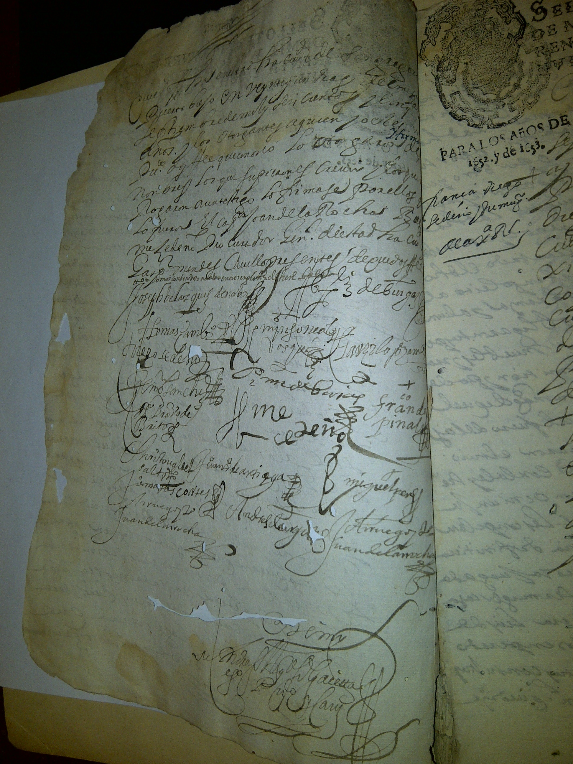 García Alcívar, Jodison Javier. (2013). Spondylus: Revista cultural Num.35/Escritura de Contrato perteneciente al Teniente General de Puerto Viejo Don José Belázquez de Navas sobre la dirección del negocio de tabaco.Ediciones La Tierra e Ilustre Municipalidad de Portoviejo, Ecuador. Página(s): 3 a 12.Publicación consultada en los Fondos Documentales del Archivo Histórico del Guayas (AHG); Guayaquil - Ecuador. Transcripción de folio: / que fecha en esta dicha Ciudad de San Gregorio de Puerto Biejo en veynte y un días del mes de Septiembre de mil y seiscientos y cinquenta y (cinco ) años y los otorgantes a quien Yo el Escribano Público doy fee que conozco; lo otorgaron y firmaron de sus nombres los que supieron, escrivieron y los que sí, rogaron a un testigo lo firmase por ellos que lo fueren; el Capitán Joan de la Rocha; Bartolomé Zedeño, Procurador General de esta dicha Ciudad, Gaspar Méndez Cavello (9), presentes, de que doy fee (y lo) otorgo= lo damos conbenidos = no bale = entre renglones = el asiento bale ? = (f) Joseph Belásquez (de Navas). (f) Bartholomé de Burgos. (f) Thomás Çambrano. (f) Martín Gonzales Vásquez, (f) Garci López Zambrano. (f) Diego Sedeño. (f) Martín de Baias. (f) Francisco de Espinales. (f) Gerónimo Sánchez. (f) Bartholomé Cedeño. (f) Pedro Bravo de Brito. (f) Christoval del Salto. (f) Joan de Artiaga. (f) Miguel Pérez. (f) Joan Macías Cortéz. (f) Andrés de Argote. A rruego y por testigos. (f) Juan de la Rrocha . Ante mí, (f) Andrés Marques de Gacetta (10) . Escribano Público y de Cavildo.